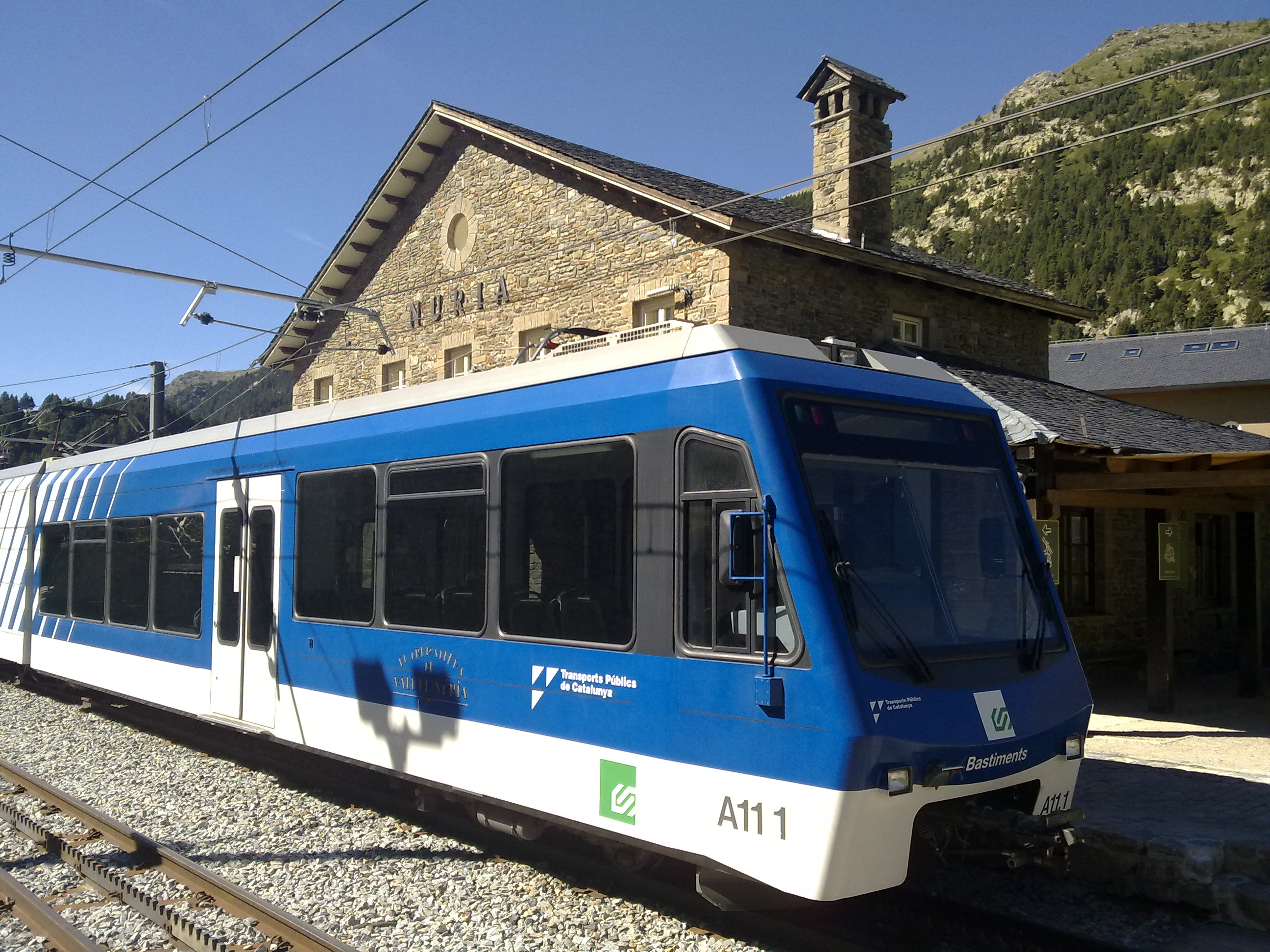 Zahnradbahnen im Bahnhof Núria